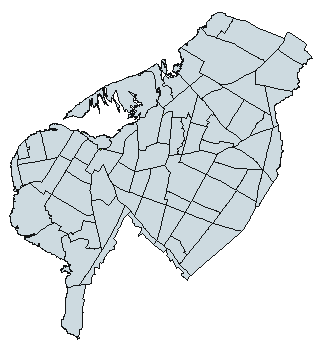 Configuración barrial de Asunción, capital de Paraguay.